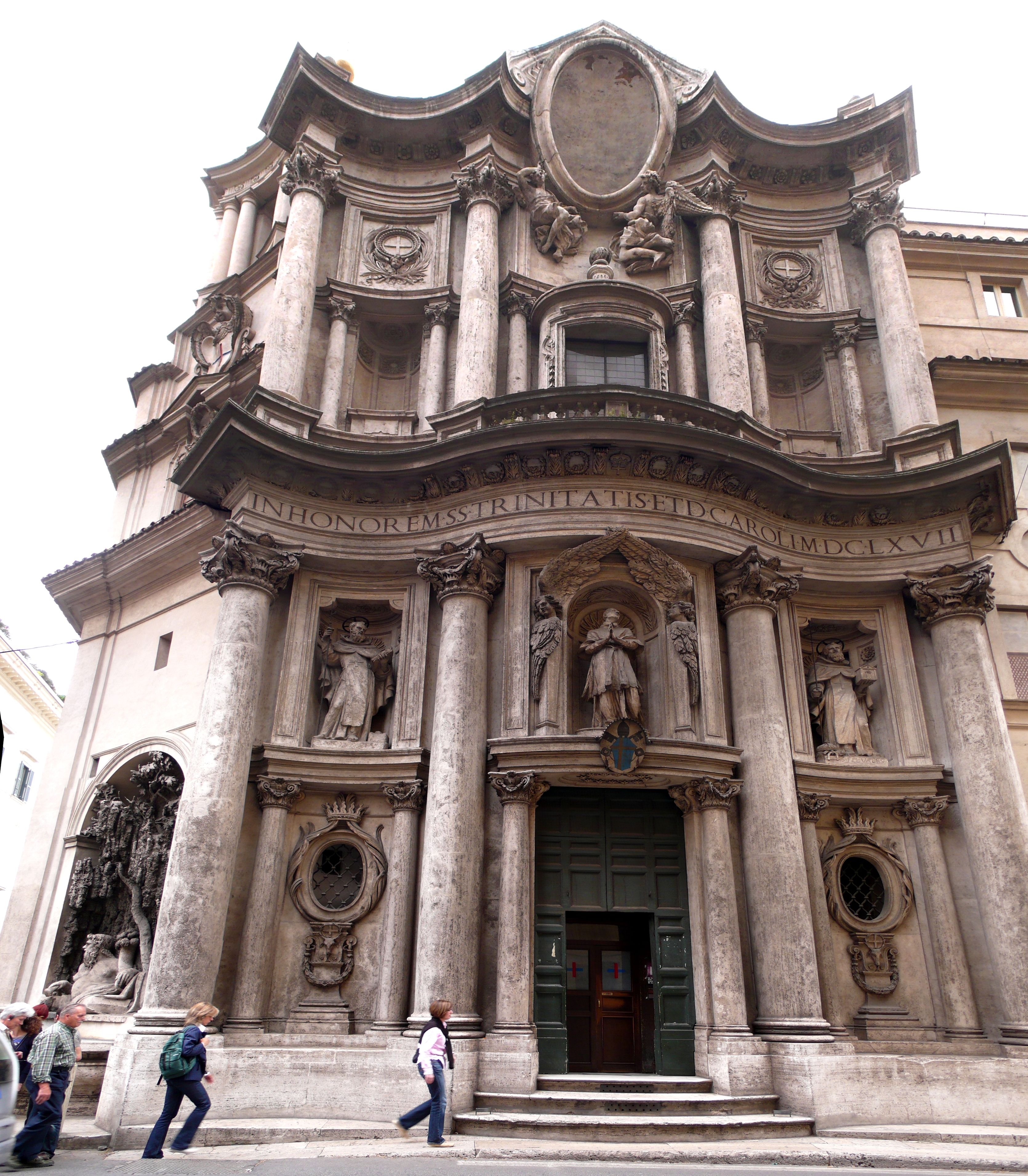 San Carlo alle Quattro Fontane (Rome), Borromini; Panorama